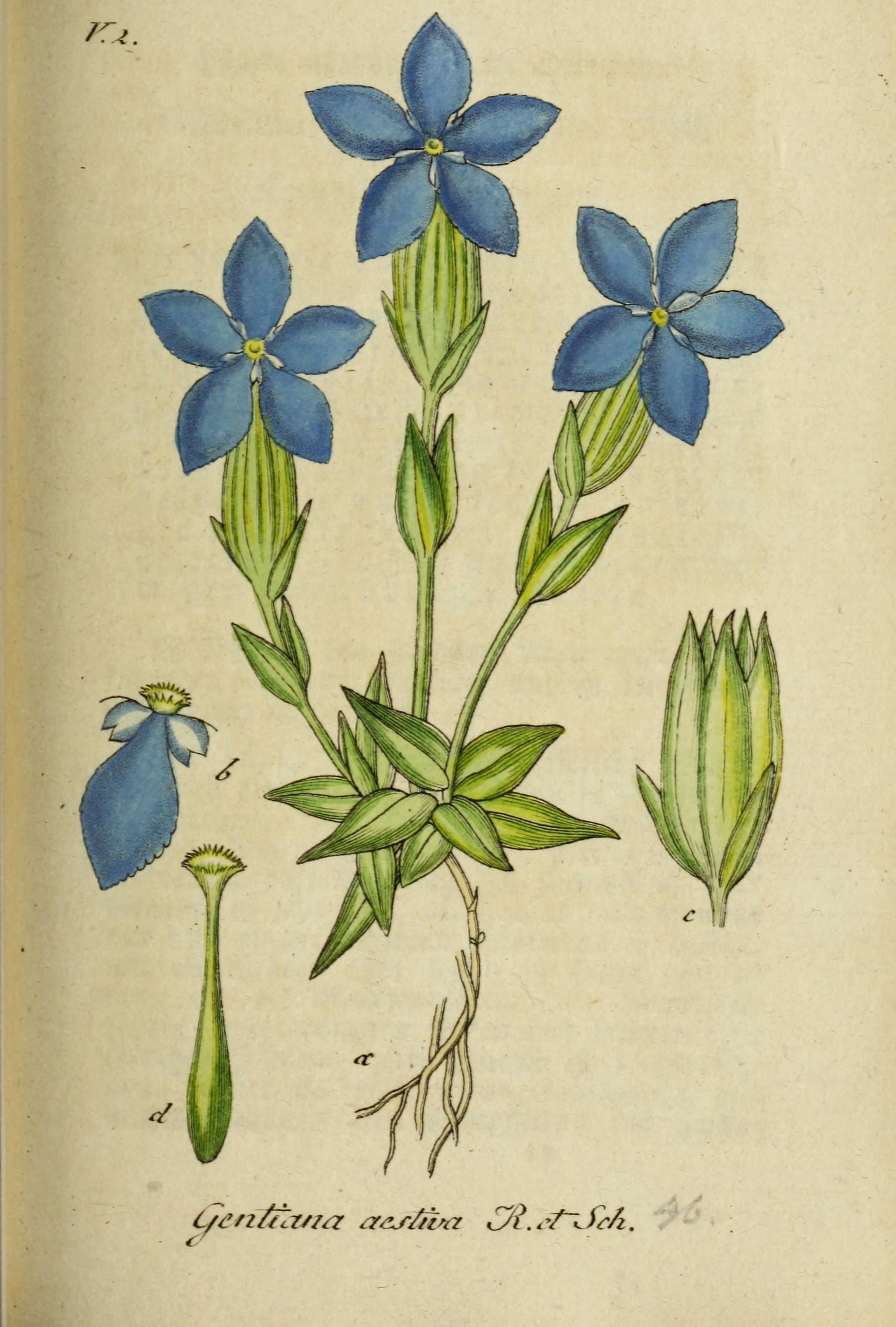 Deutschlands flora in abbildungen nach der natur /